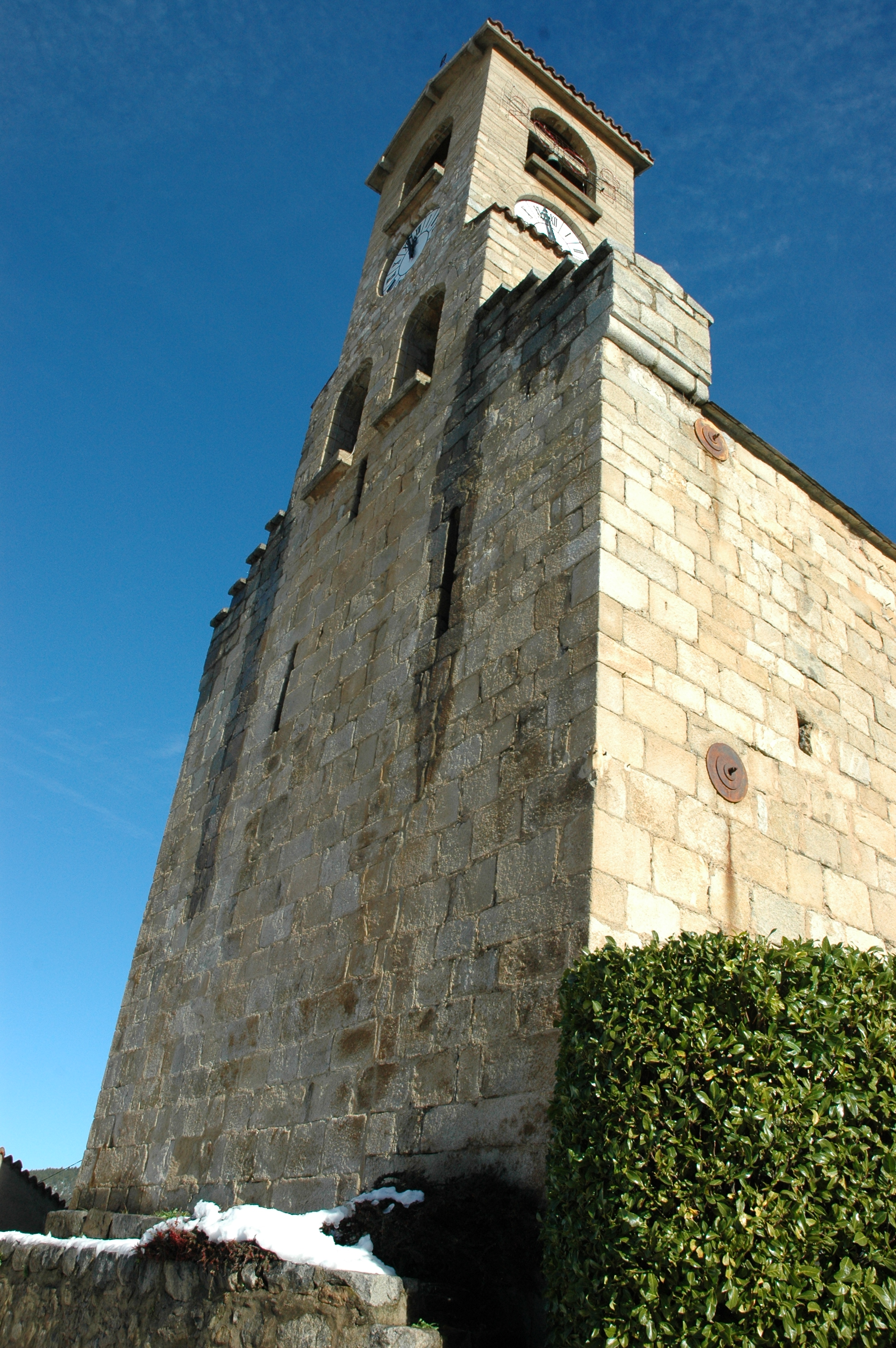 Sant Sadurní de Vernet